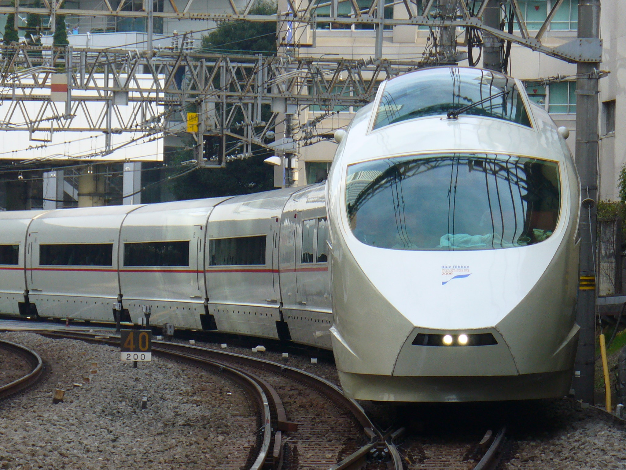 小田急ロマンスカーVSE